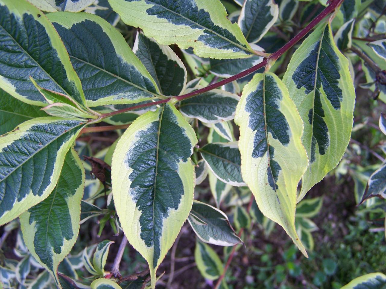 Weigela florida `Variegata` (pl. krzewuszka cudowna)